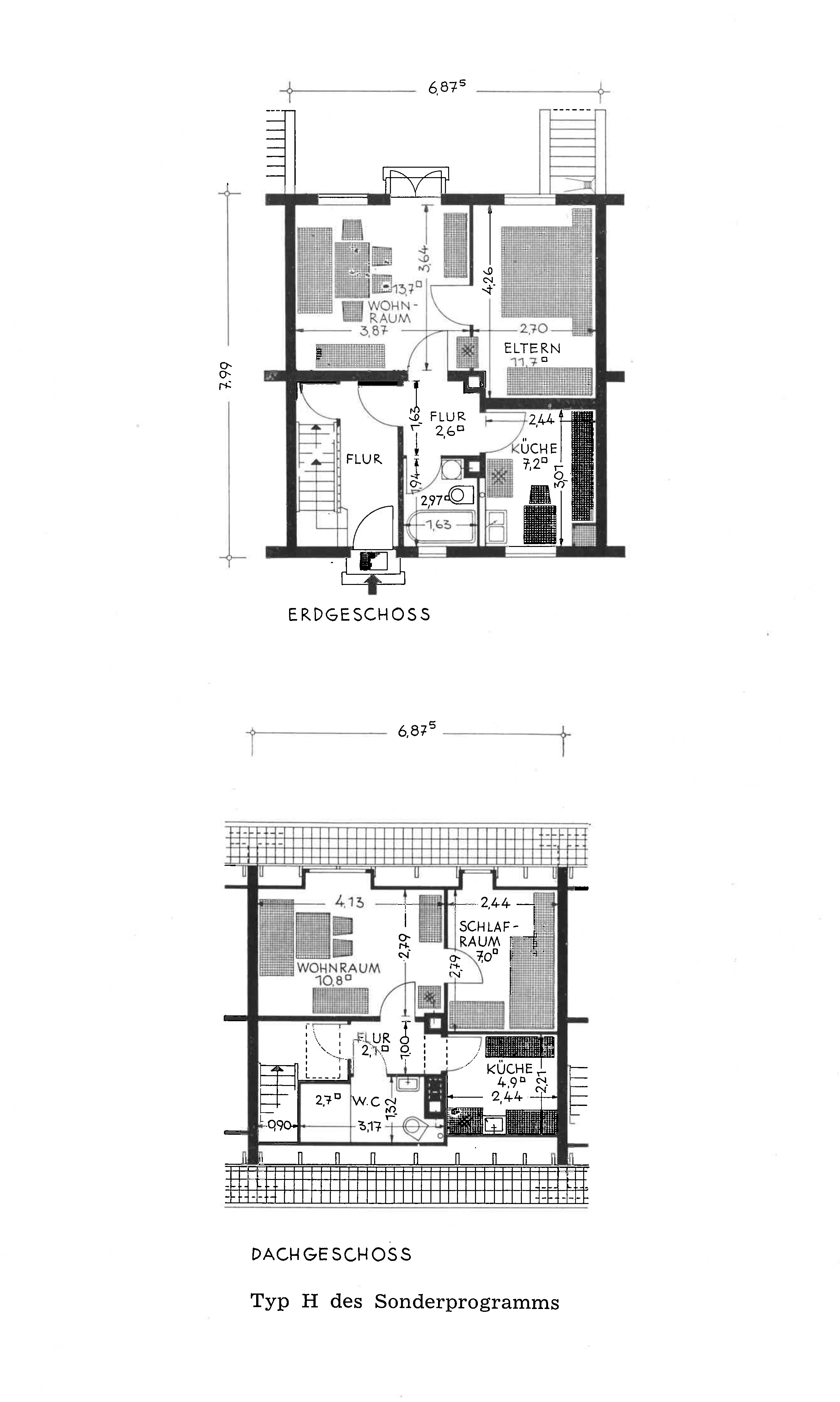 Haustyp H des ERP-Sonderprogramms 10.000 Flüchtlingswohnungen